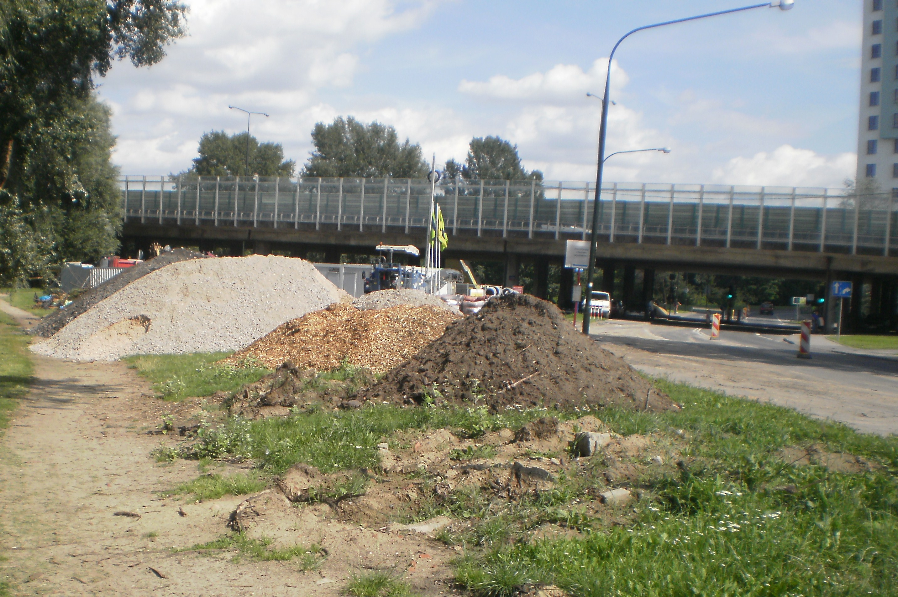 Remont ulicy Gwiaździstej w Warszawie.